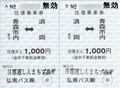 青森線往復乗車券(青森市内～浪岡)